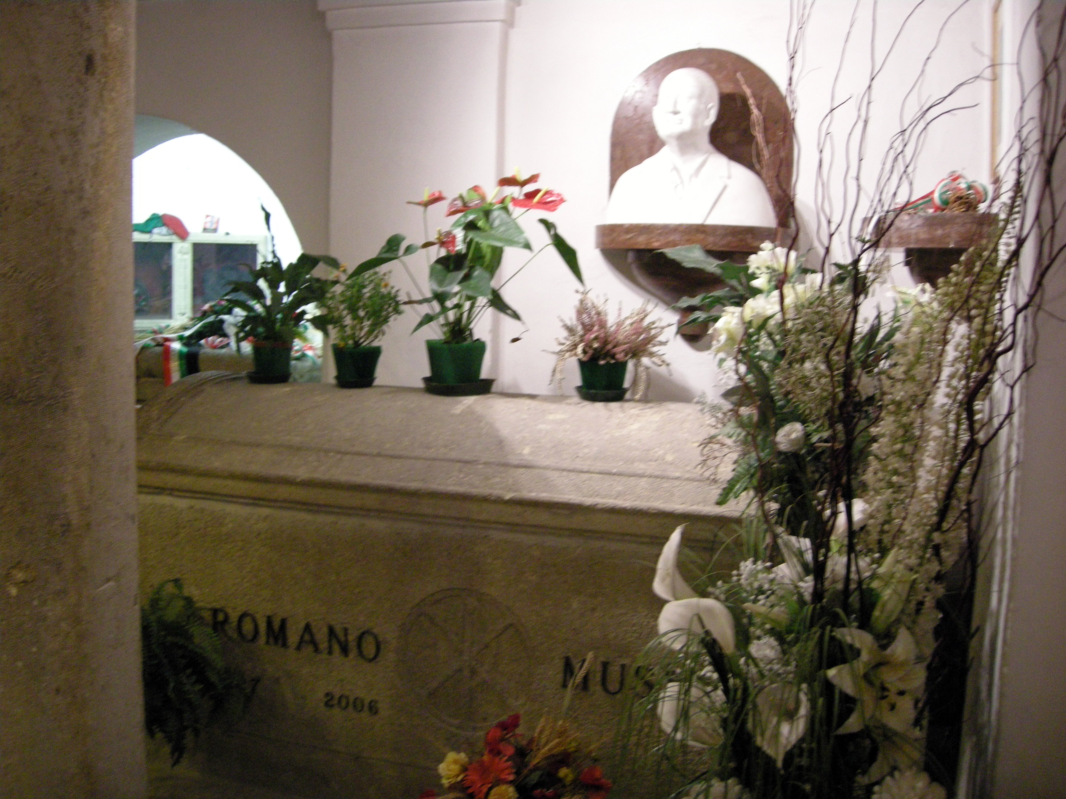 Cripta del cimitero di San Cassiano a Predappio, tombe della famiglia Mussolini